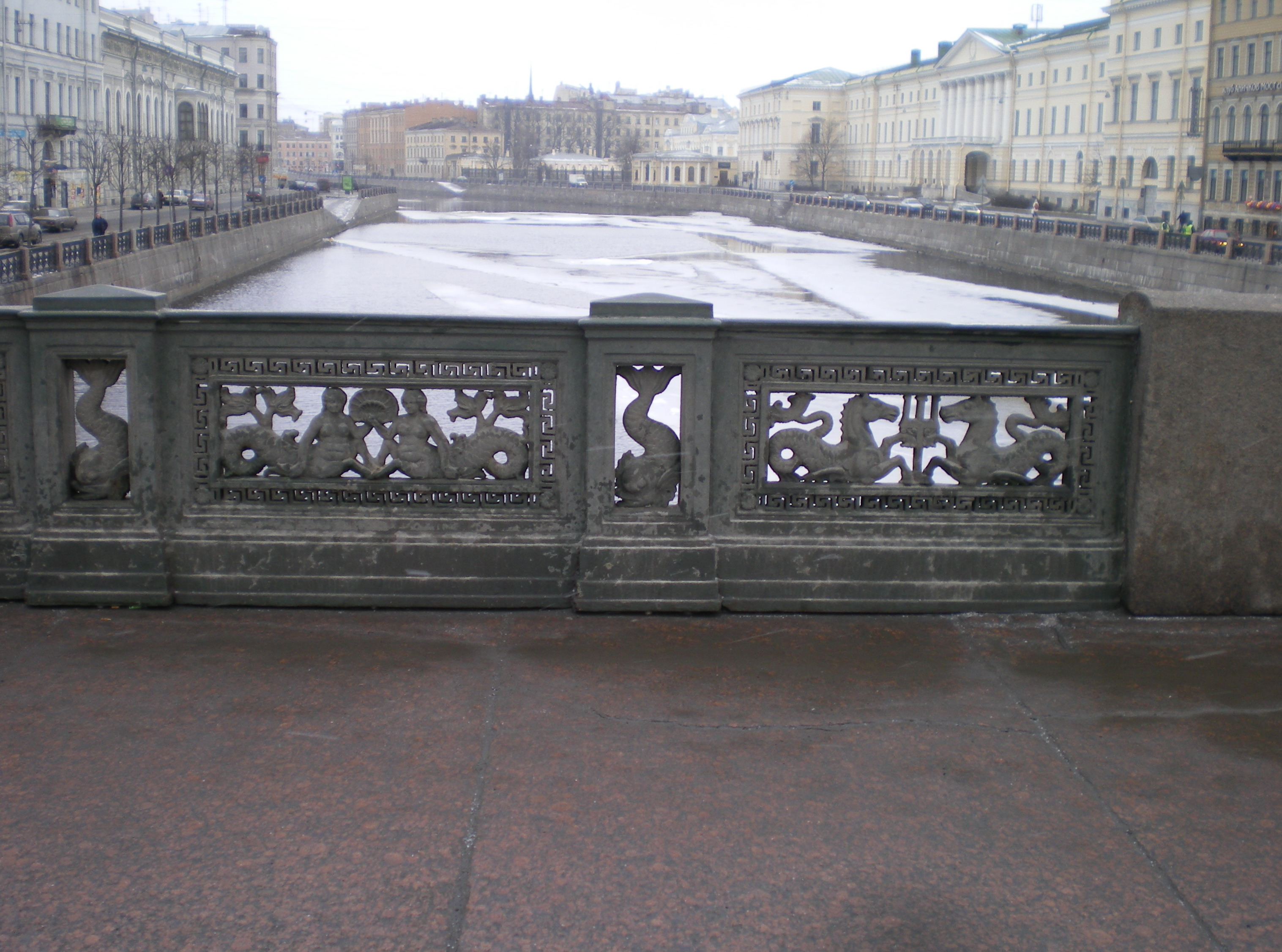 Решётка Аничковогого моста